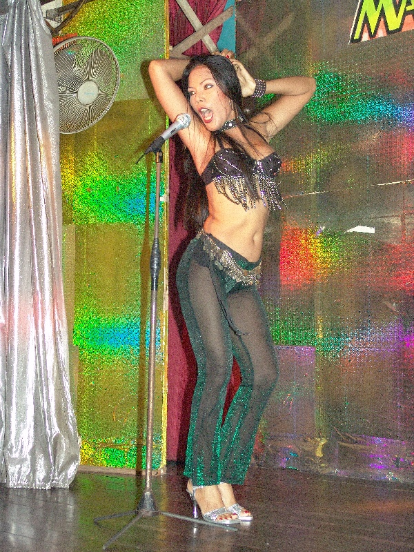 Natta Klomklao auf der Bühne einer Cabaret-Show, Pattaya Sept. 2004